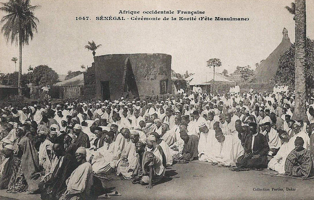 François-Edmond Fortier, Sénégal. Cérémonie de laKorité (fête musulmane). Afrique Occidentale - Sénégal.